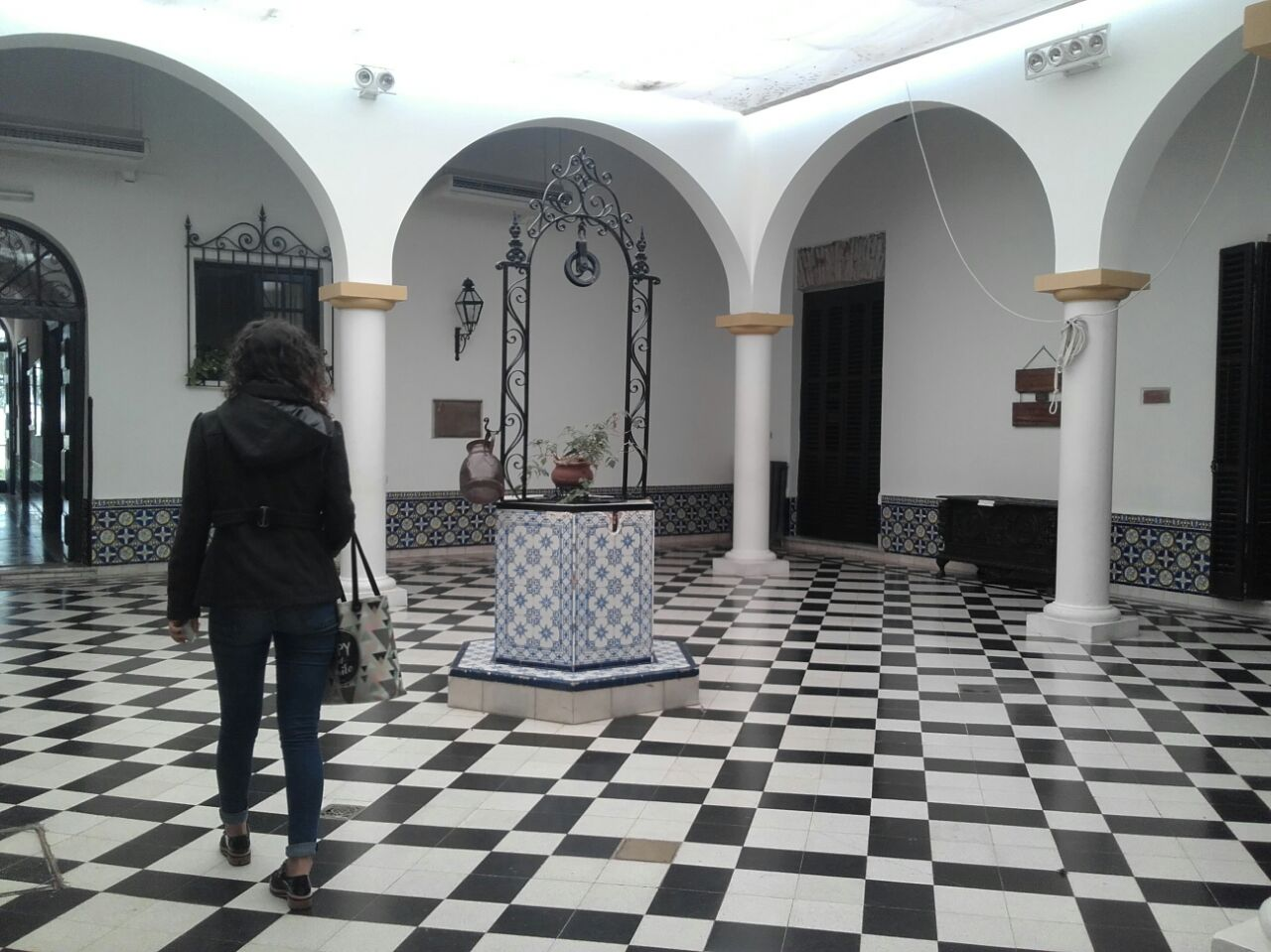 Pertenece al Museo, biblioteca y archivo histórico municipal de San Isidro, Dr Beccar Varela